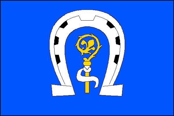 Vlajka obce Podmoklany